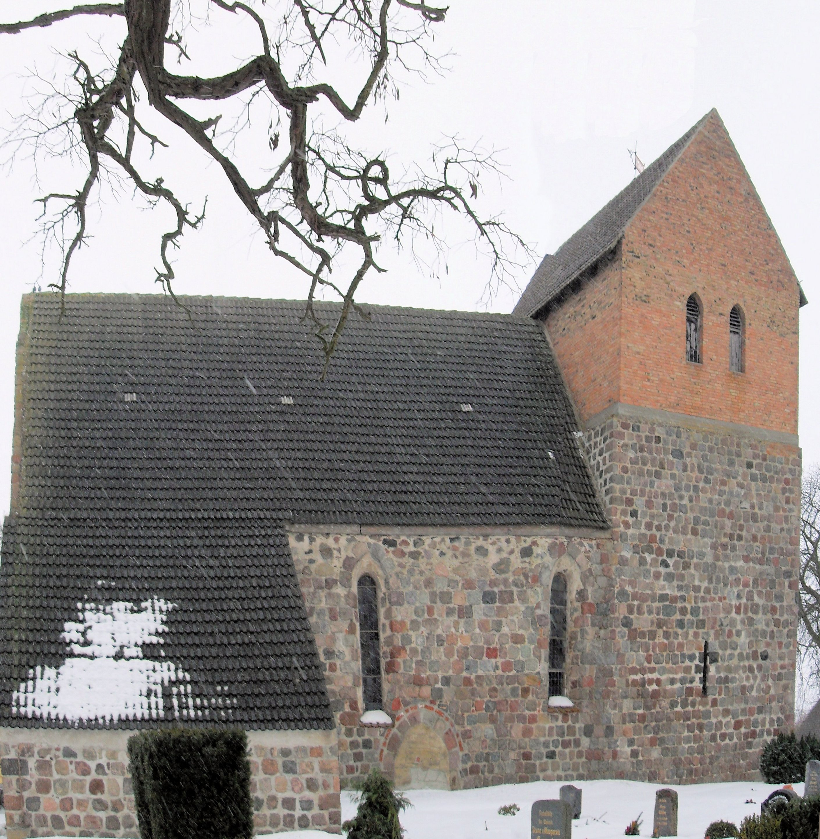 Kirche in Pinnow, Landkreis Uckermark, Deutschland